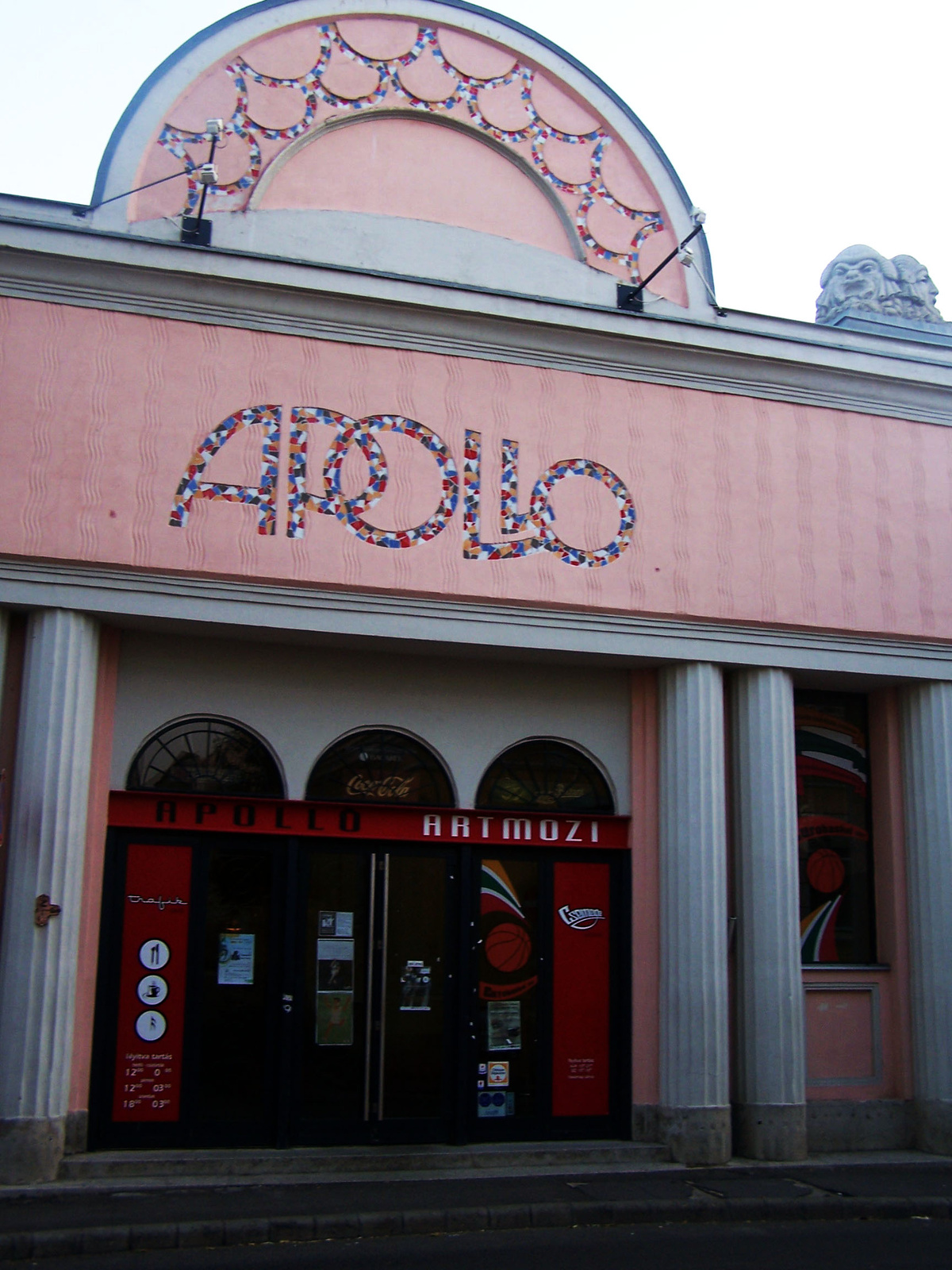 Apolló Filmszinház (Pécs, Perczel Miklós utca 22.) This is a photo of a monument in Hungary. Identifier: 11257